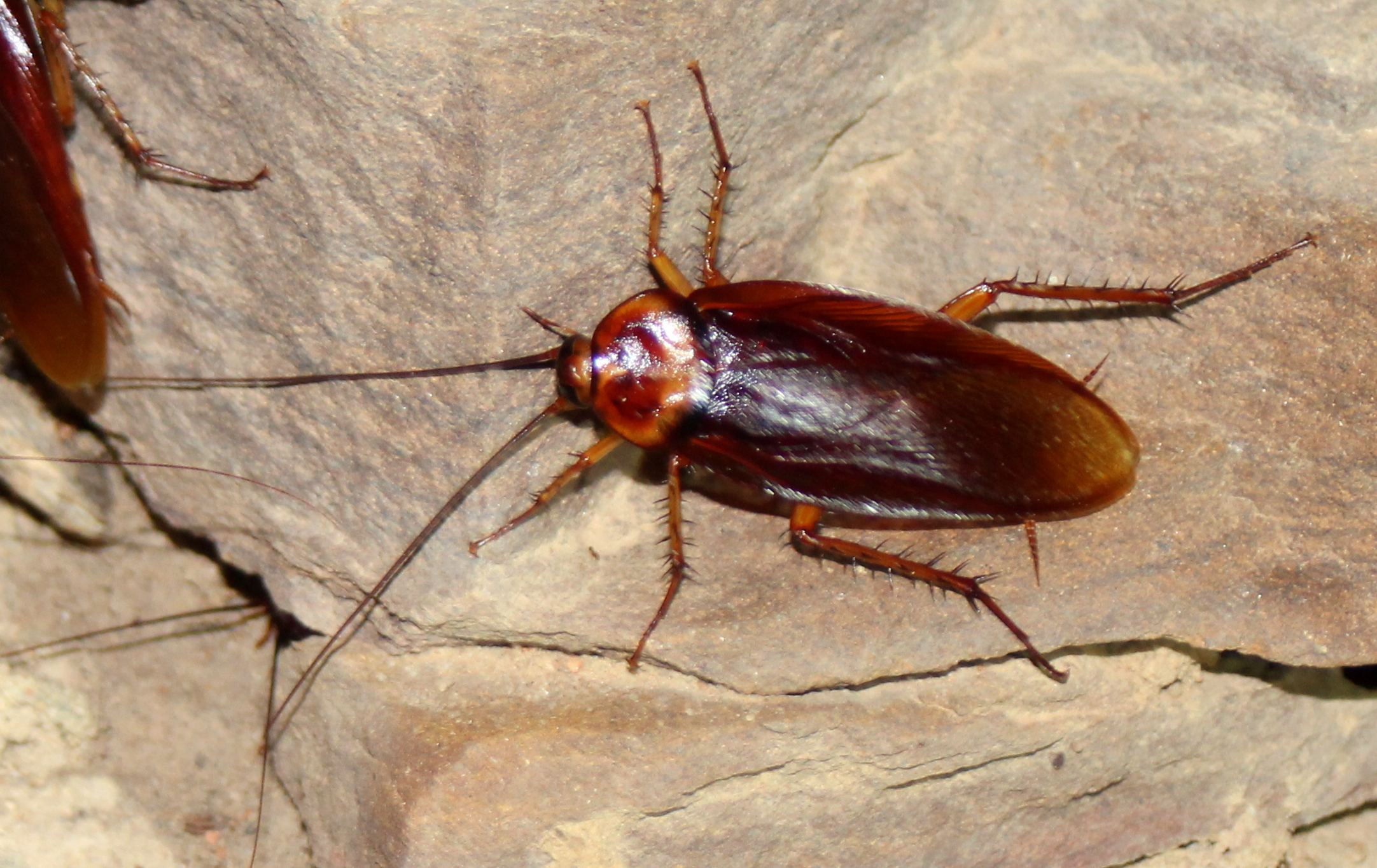 Onbekende kakkerlak in Isalo